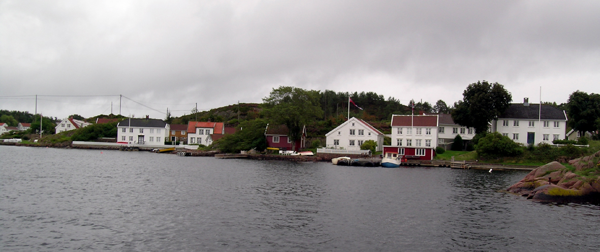 Hesnesøy, Grimstad, Norway